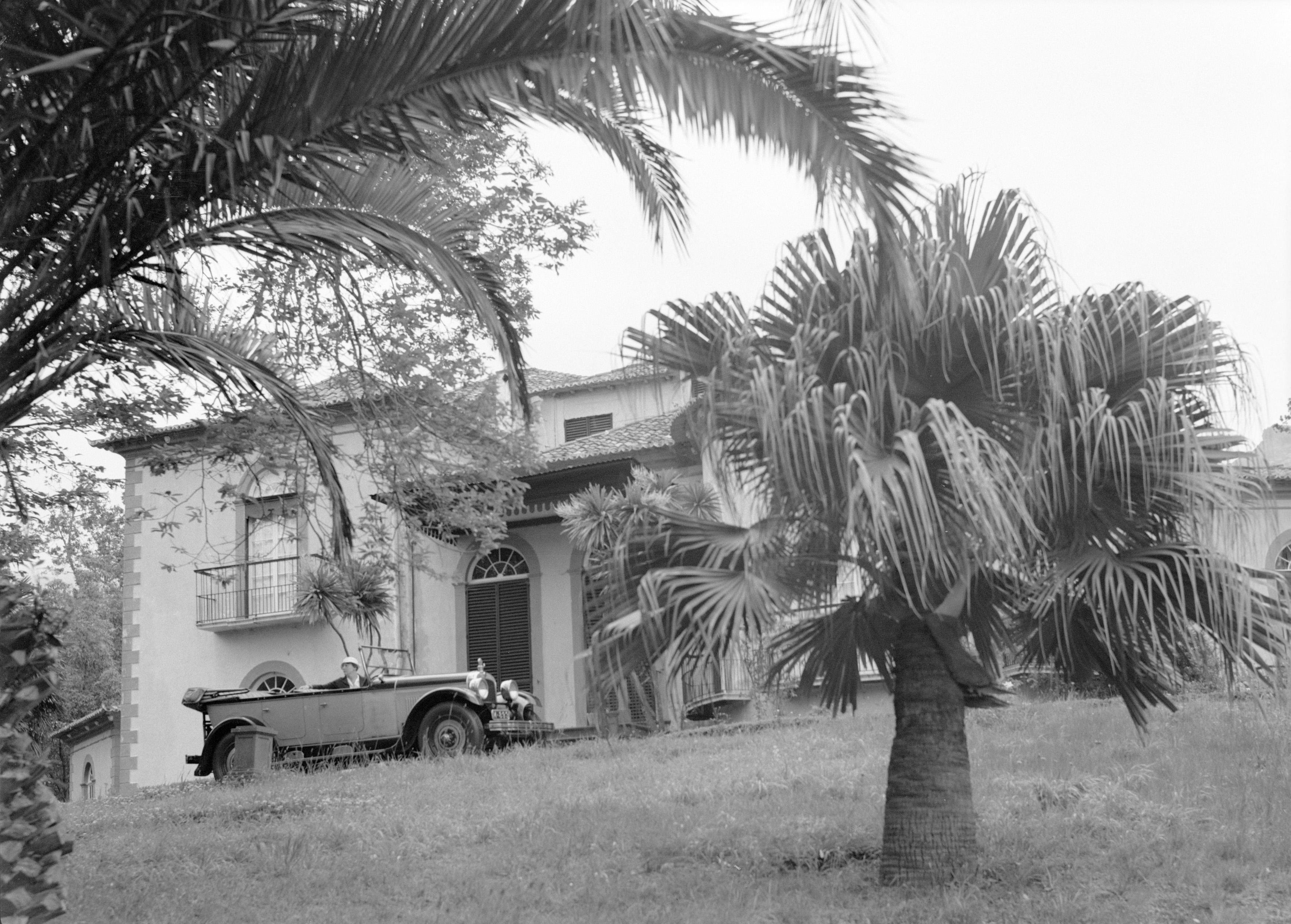 Collectie / Archief : Fotocollectie Van de Poll Reportage / Serie : Madeira Beschrijving : Landhuis in parkachtige omgeving met op de voorgrond klassieke cabriolet met Nell Langlais Datum : 1934 Locatie : Madeira, Portugal Trefwoorden : auto's, palmbomen, villa's Persoonsnaam : Langlais, Nell Fotograaf : Poll, Willem van de Auteursrechthebbende : Nationaal Archief Materiaalsoort : Glasnegatief Nummer archiefinventaris : bekijk toegang 2.24.14.02 Bestanddeelnummer : 190-0189